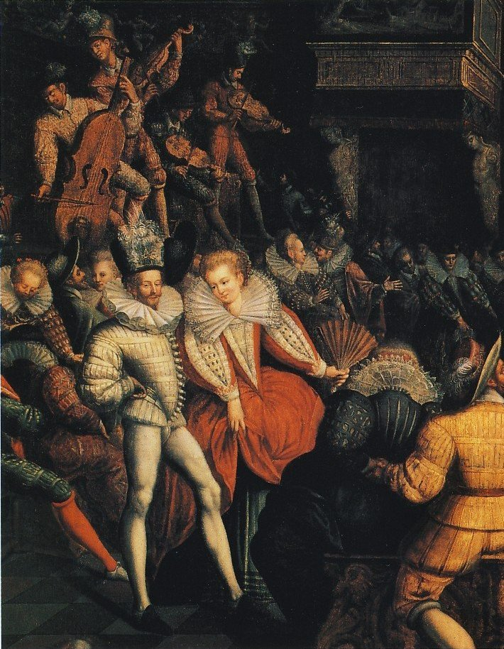 detail